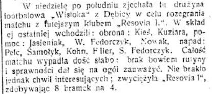 Informacja z "Kurjera Lwowskiego", z dnia 5.10.1910 r. informująca o rozgranym w Rzeszowie meczu pomiędzy drużynami Wisłoki Dębica oraz Resovii Rzeszów.